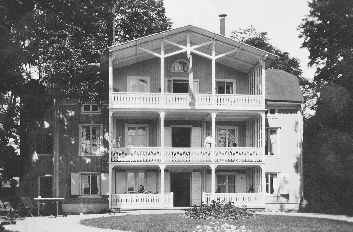 Smedslättens gård på sommaren 1910